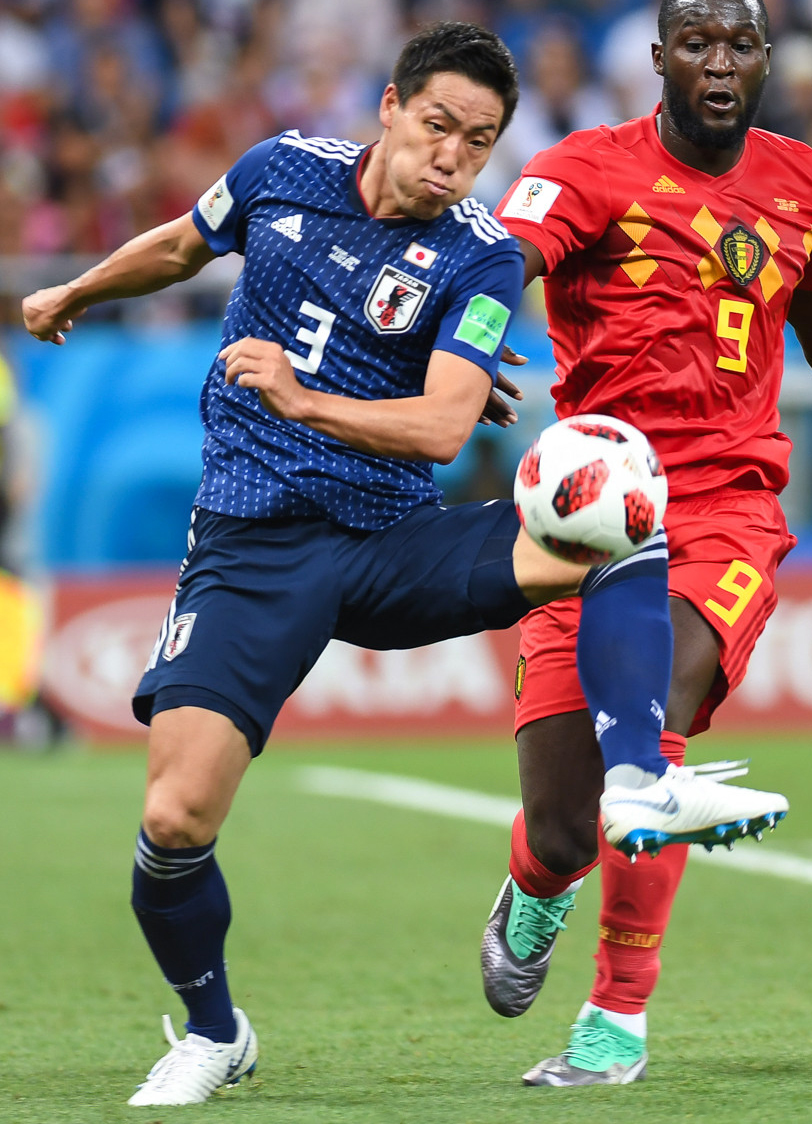 Потрясающий камбэк сборной Бельгии в матче с Японией